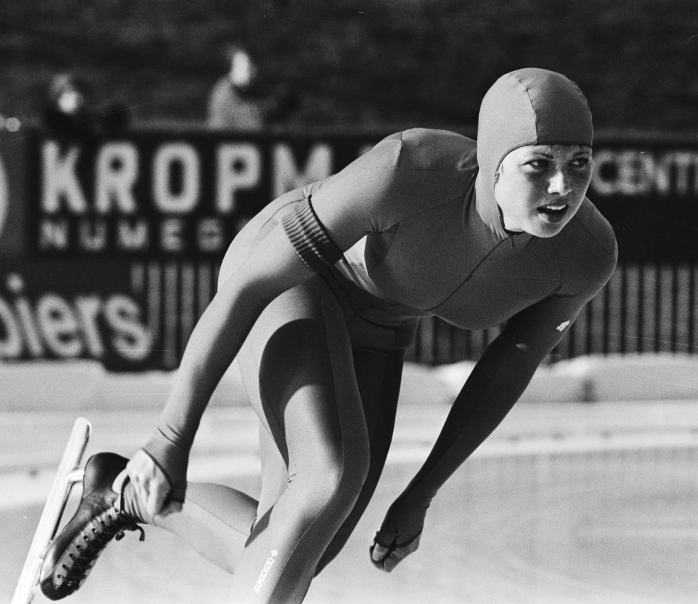 Ria Visser